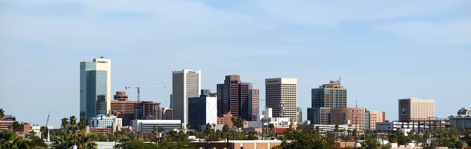 Phoenix skyline